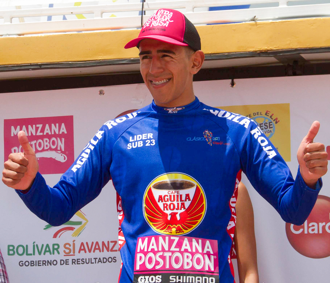 Et.1 Clásico RCN 2016 Sebastián Molano en el podio